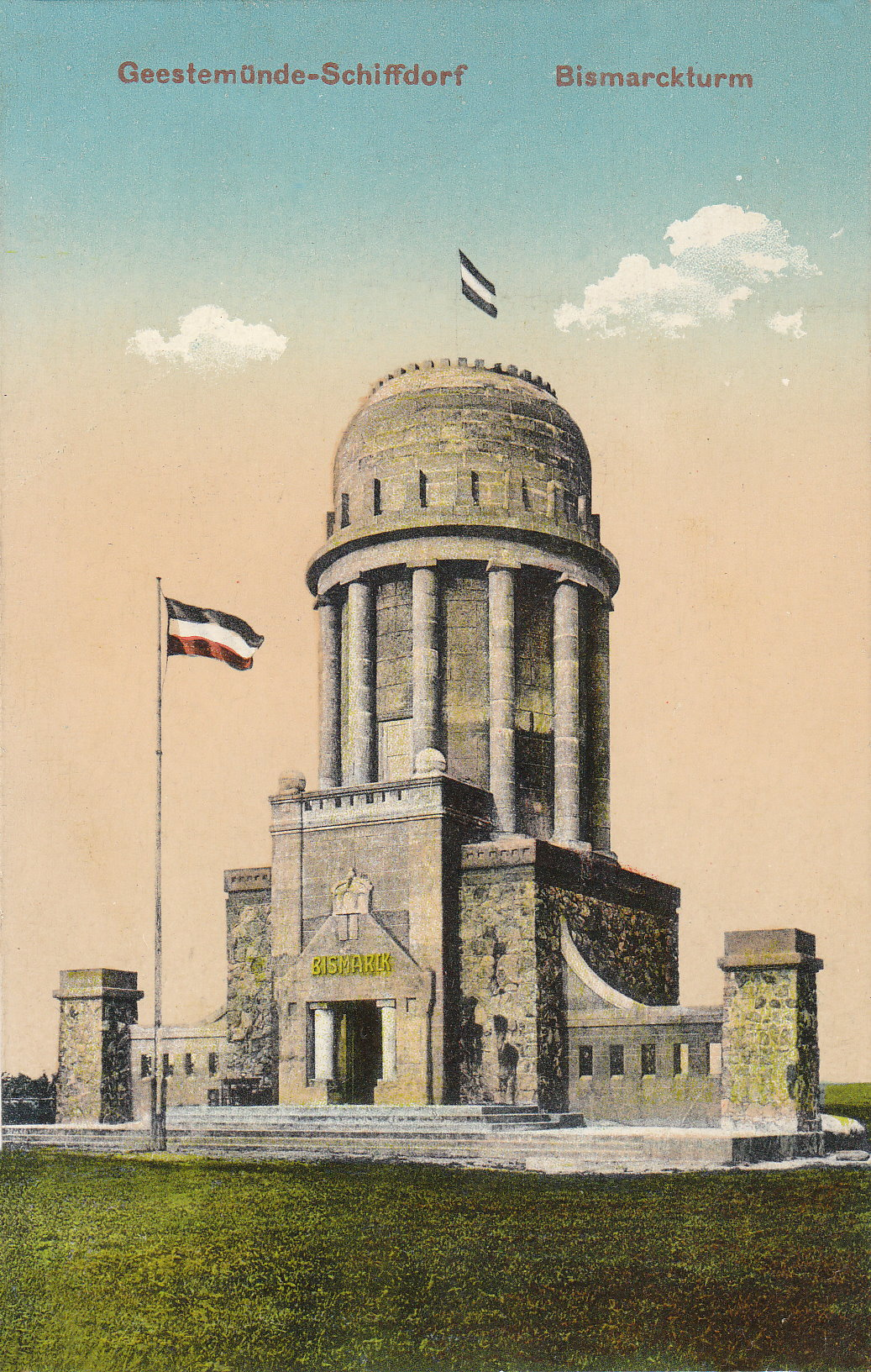 Bismarckturm in Schiffdorf/Geestemünde